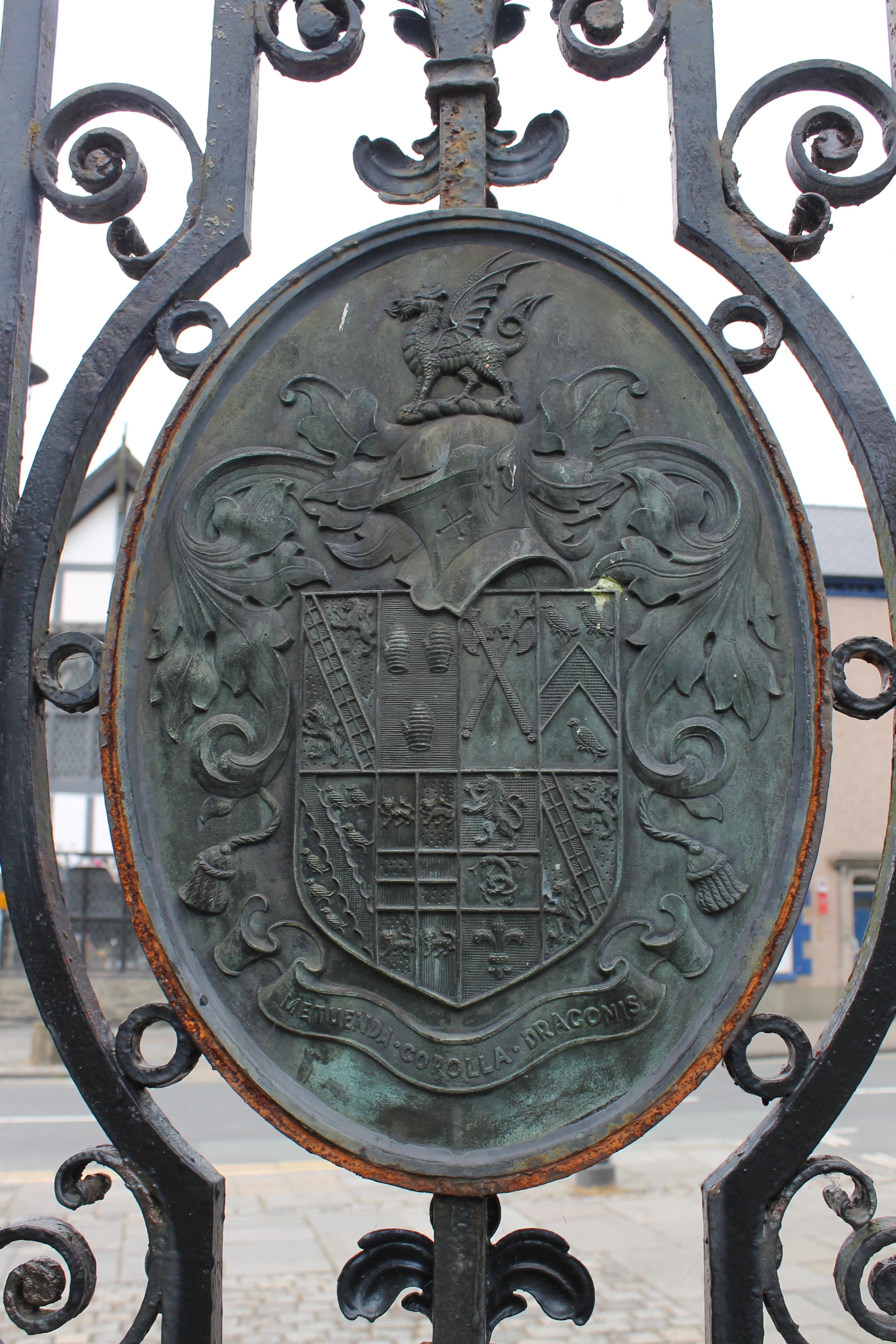 Arfbais ar gatiau Plas Machynlleth. Mae'r arfbais Ardalydd Londonderry.